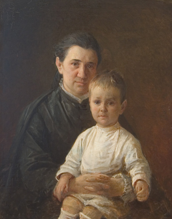 Ге Николай Николаевич. Портрет Евдокии Николаевны Костычевой, рожд. Фокиной (1845-около 1915) с сыном Сергеем Павловичем (1877-1931), впоследствии академиком биохимии и микробиологии. Ок. 1880. Холст, масло. 85 х 57. В 1880-1890 годы Ге обратился к жанру портрета. Моделями художника чаще всего были его родные и друзья. С семьей ученого-почвоведа Павла Андреевича Костычева Ге связывали теплые дружеские отношения. На портрете изобажена жена П.А. Костычева Евдокия Николаевна Костычева, урожденная Фокина (1845-около 1915) с сыном Сергеем Павловичем (1877-1931), впоследствии академиком биохимии и микробиологии.